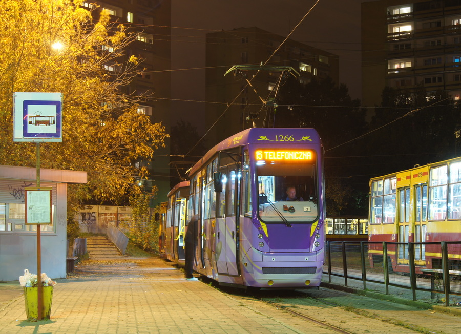 Najnowsza modernizacja MPK Łódź ,,woltan,, 1266+1267.